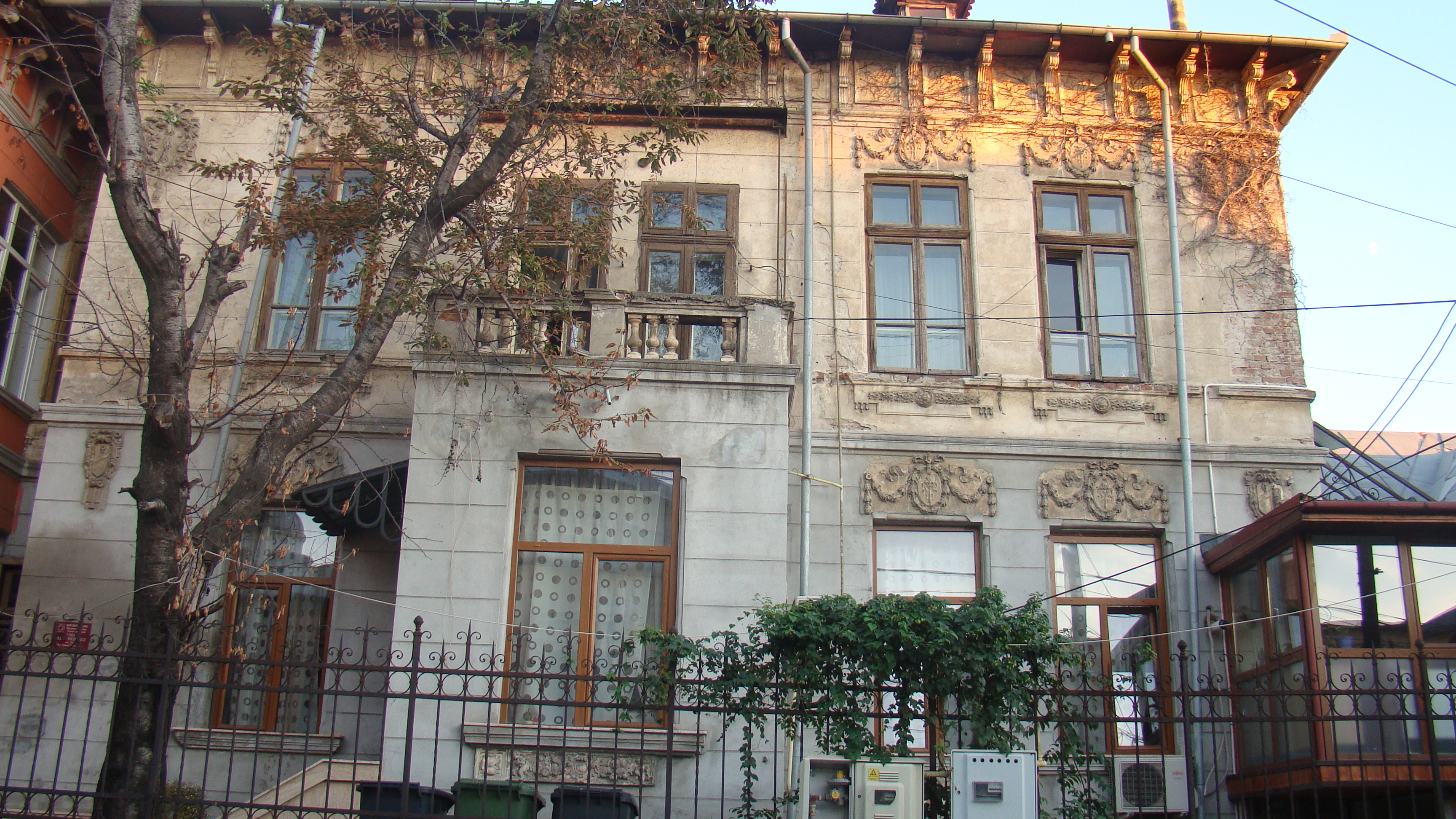 Casa Traian Nicolescu